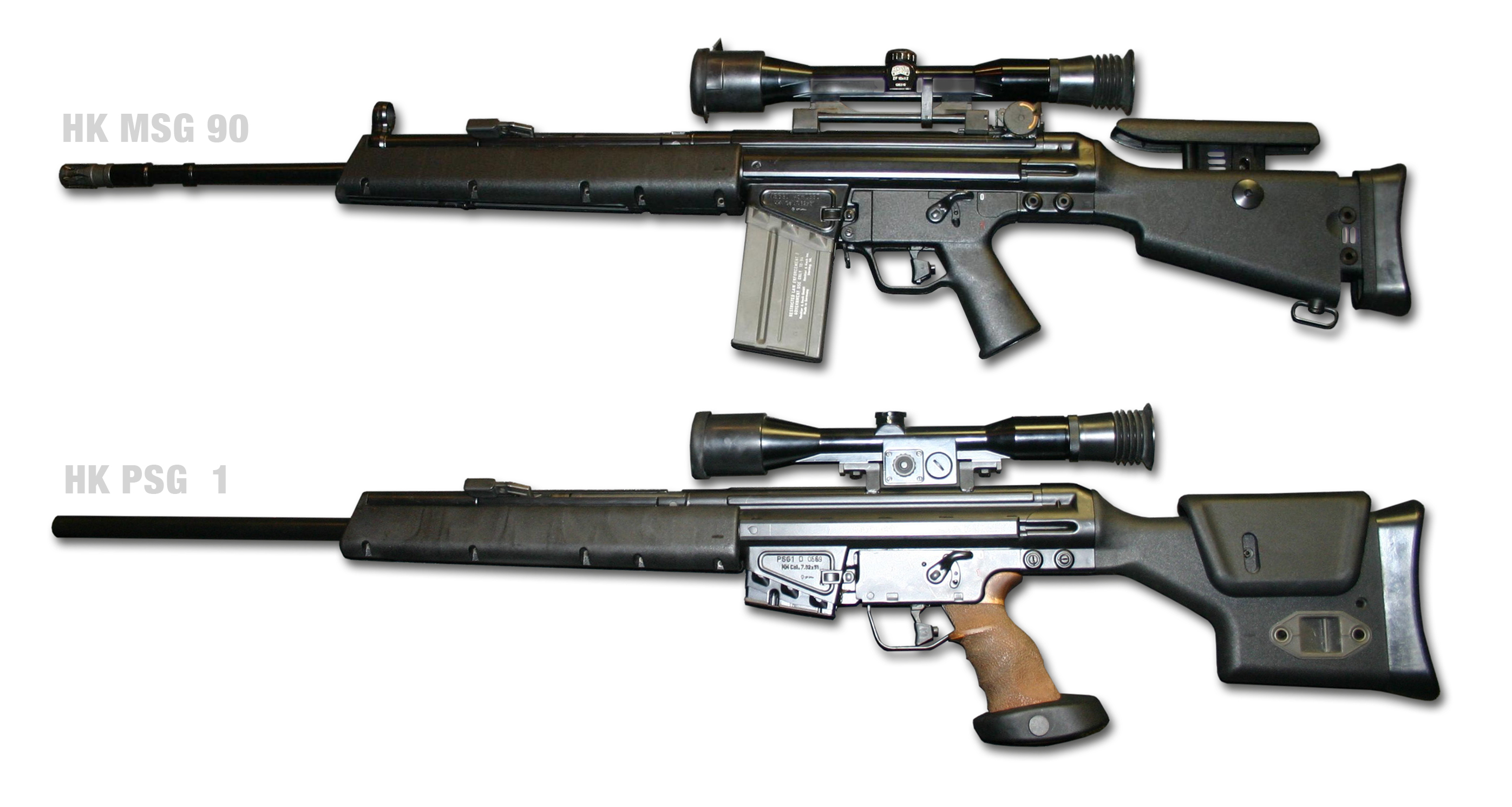 Deutsche Gewehre MSG 90 und PSG 1